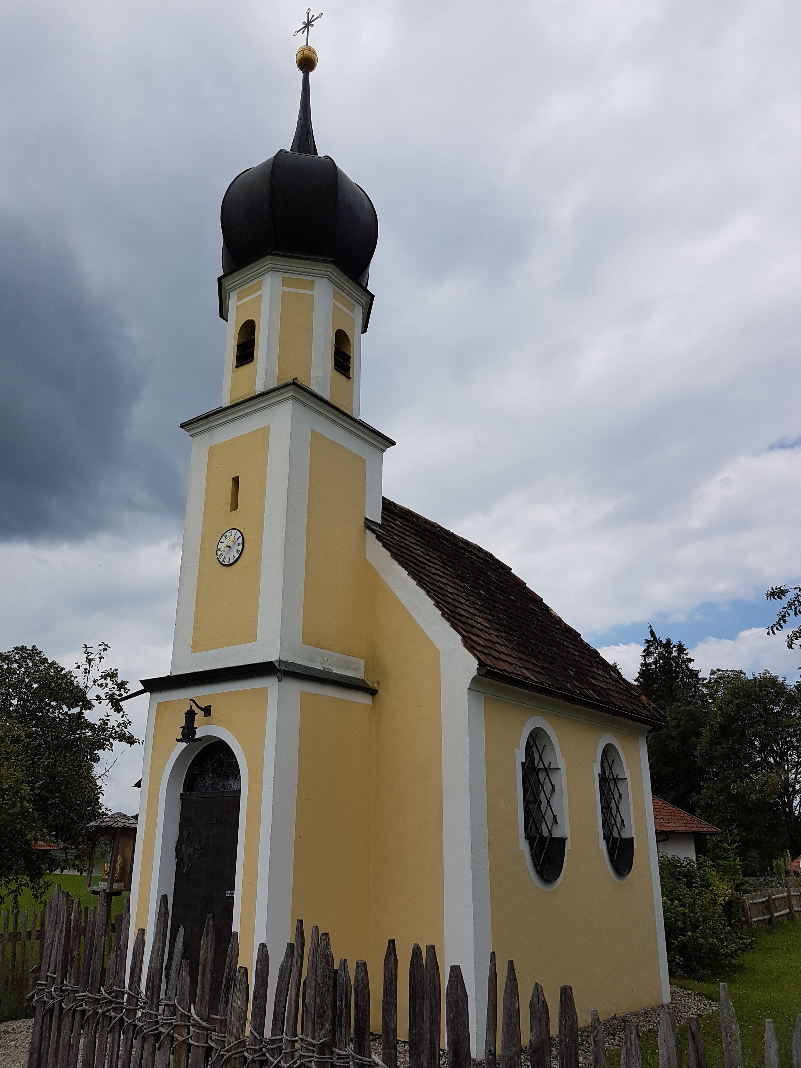 Kapelle